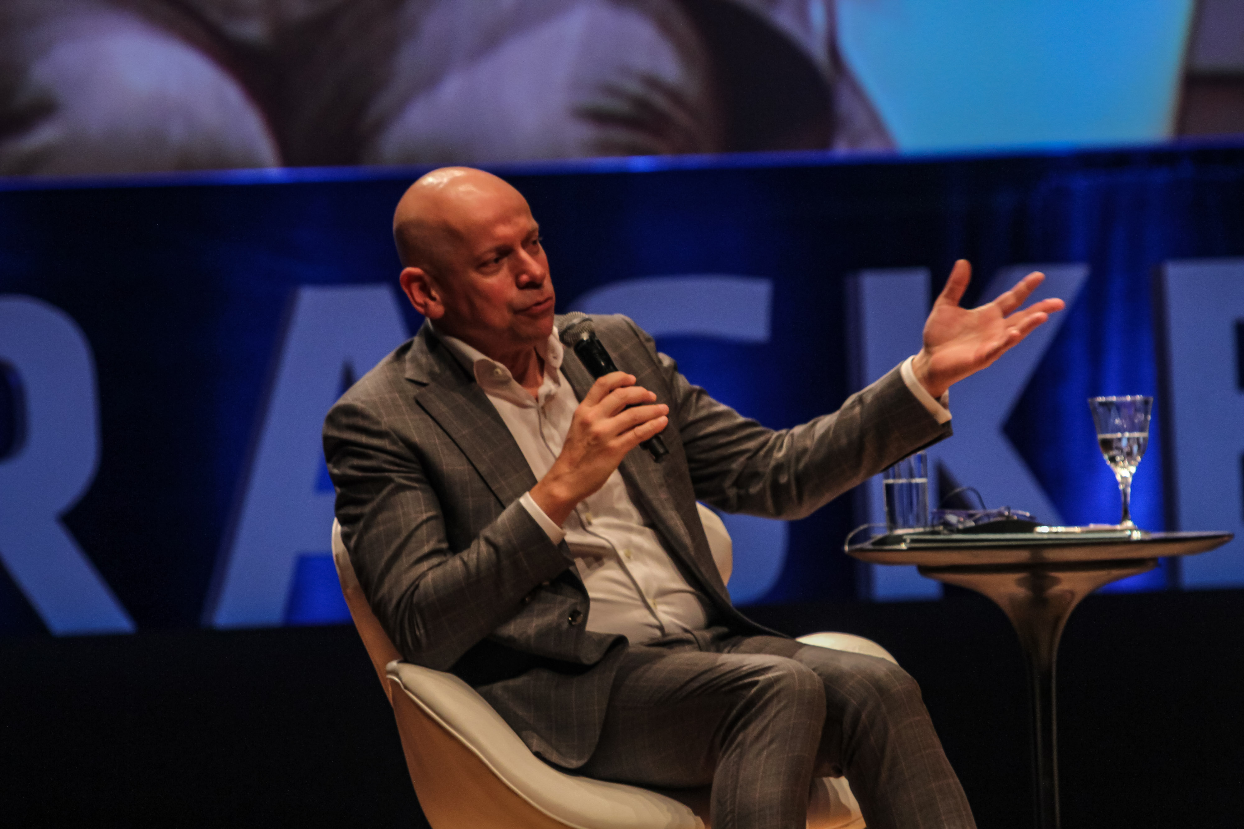 Convidados: Gilles Lipovetsky, filósofo francês, e Leandro Karnal, historiador brasileiro Data: 17 de setembro de 2018 Local: Teatro Castro Alves - Salvador Crédito das imagens: Bapress – Eric Salles